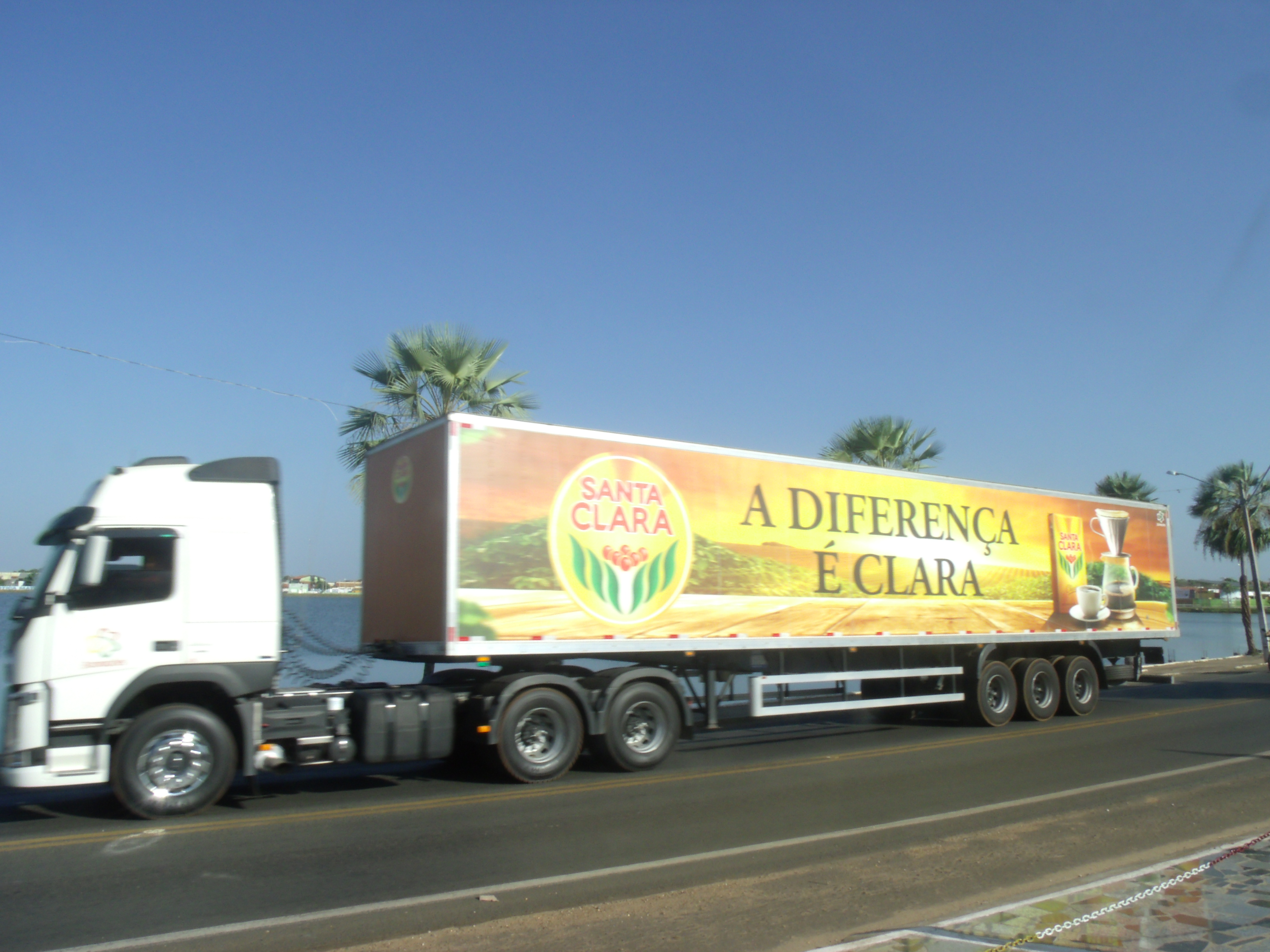 Carreta do Café Santa Clara passando na rodovia BR-343, no norte do Piauí.